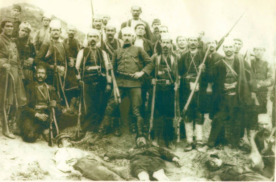 Maj 1913, Çeta Arrzare me në krye Demirali Arrzën